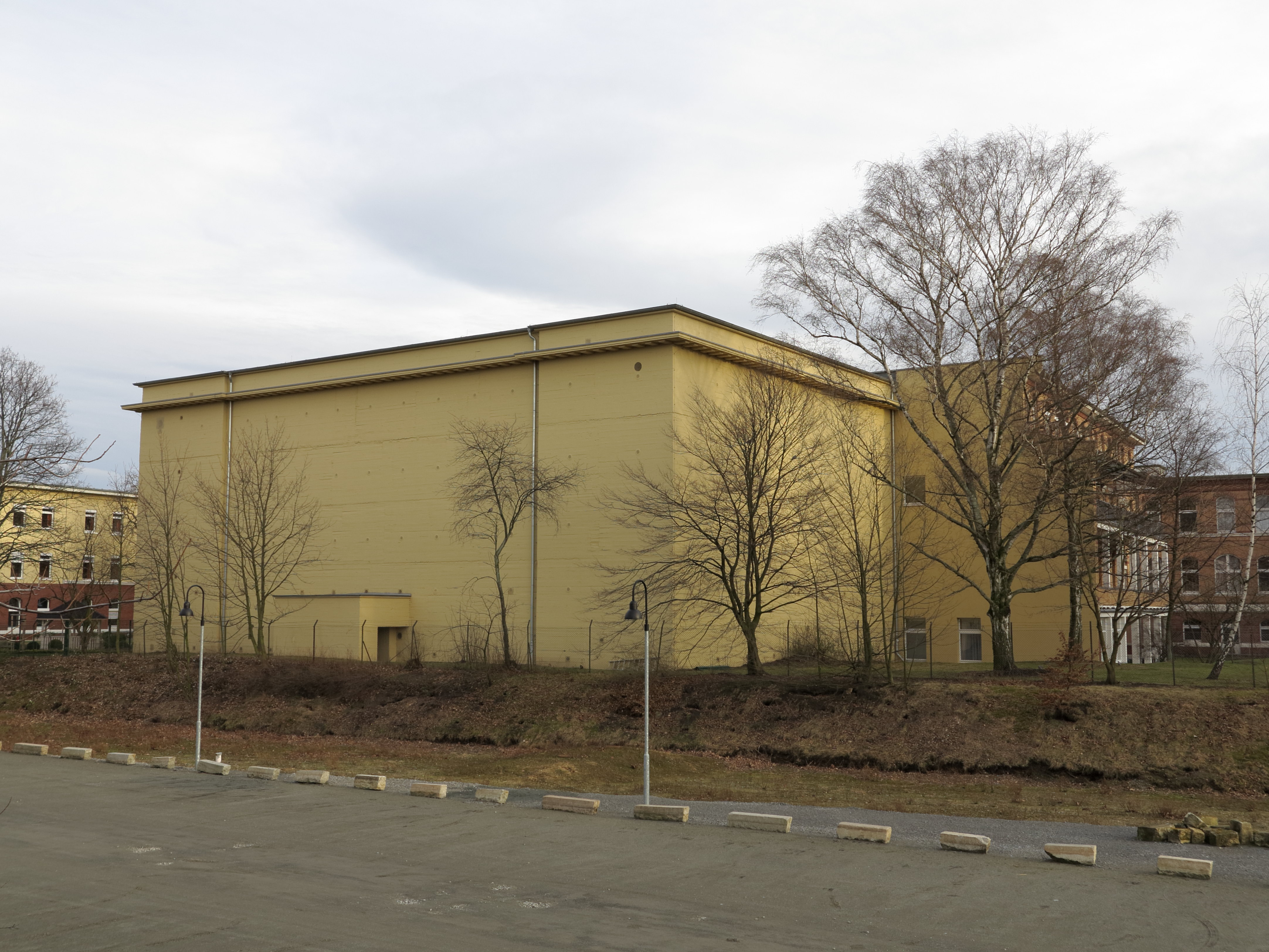 Der OP-Bunker (Celler Straße 1) in Braunschweig. Er bot 1000 Personen Schutz auf fünf Etagen. Er besaß zwei Operationssäle, einen Kreißsaal, Räume für Schwestern und Ärzte sowie Lagerräume.